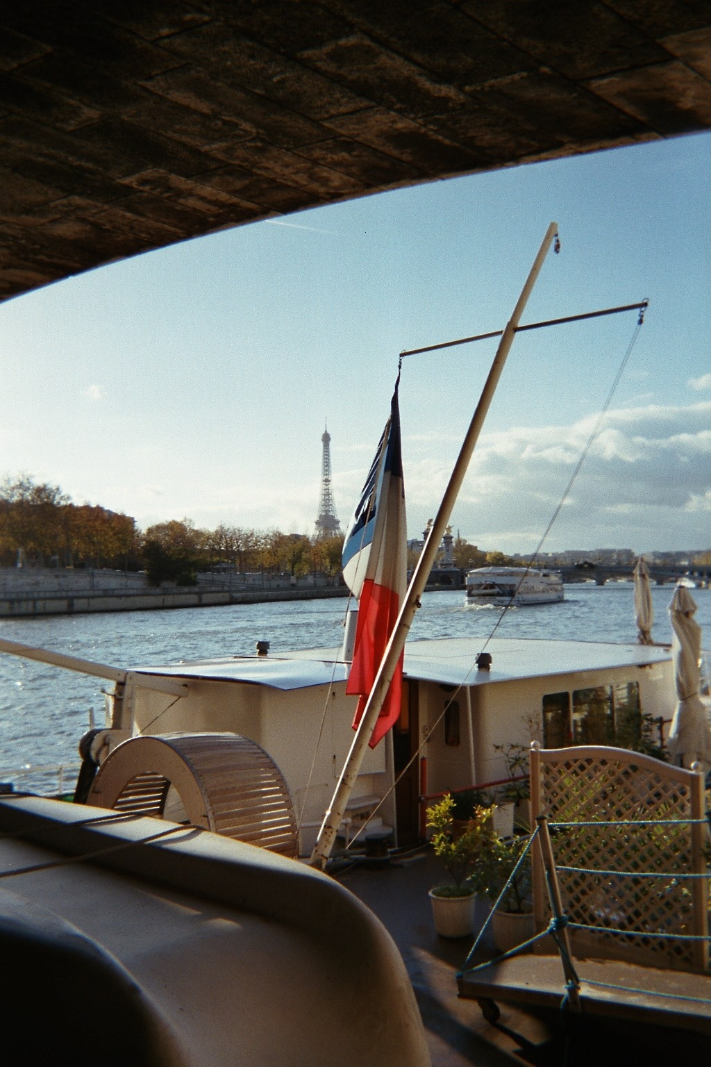 Drapeau, Seine, péniche et bateau non identifié, Tour Eiffel Paris 041130. Melusin propriétaire des négatifs. M:)